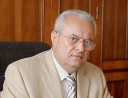 Ervand Zaxaryan